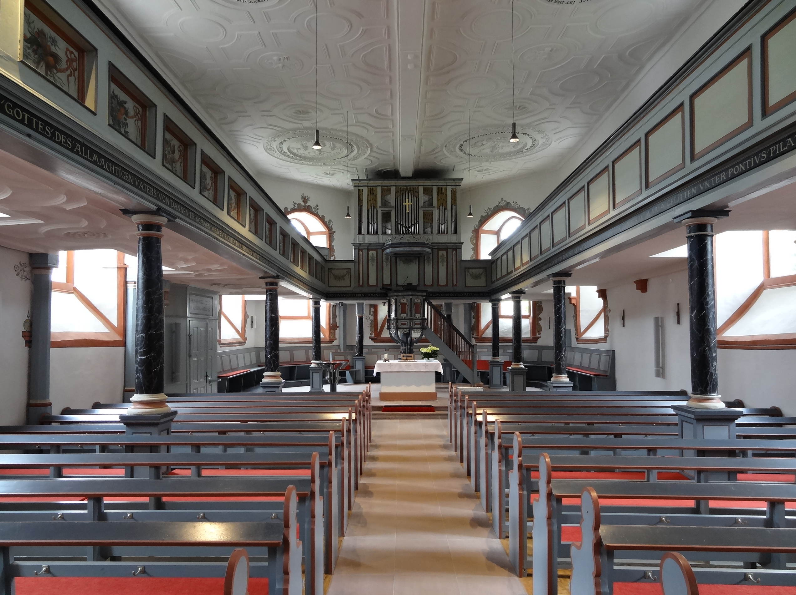 Holzheim Kirche Innenraum